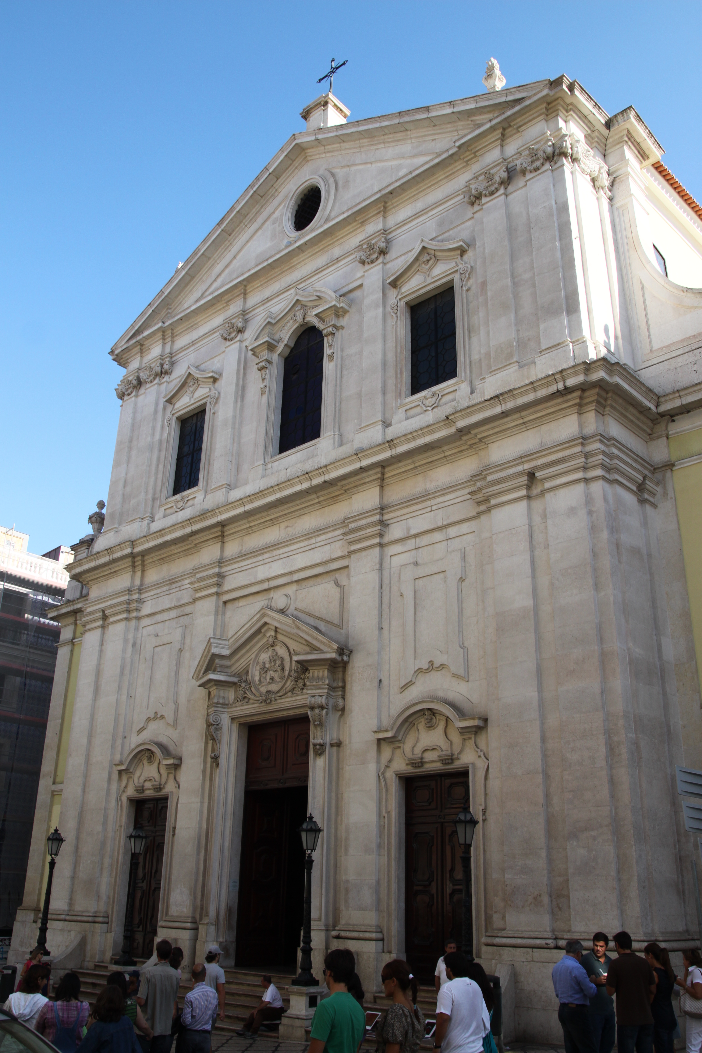 Igreja de Nossa Senhora dos Mártires This file was uploaded for Wiki Loves Monuments in Portugal with the unique identifier 74983.